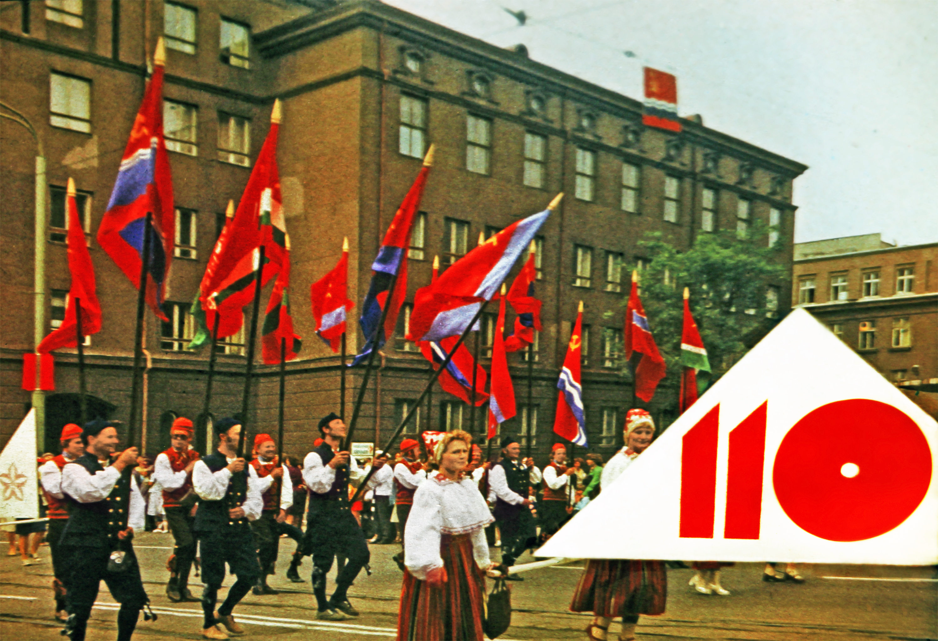 XIX üldlaulupeo rongkäik. Narva mnt.1980.a